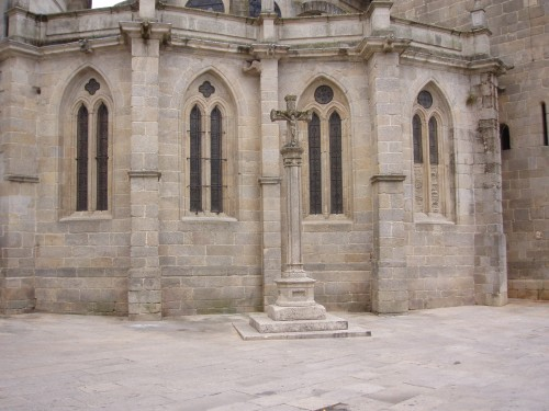 Cruceiro del atrio de la catedral de Lugo